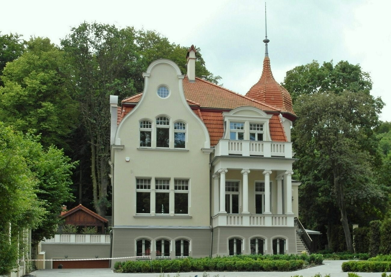 Willa Kirsch. Gdańsk Wrzeszcz Górny, ul. Jaśkowa Dolina 44.